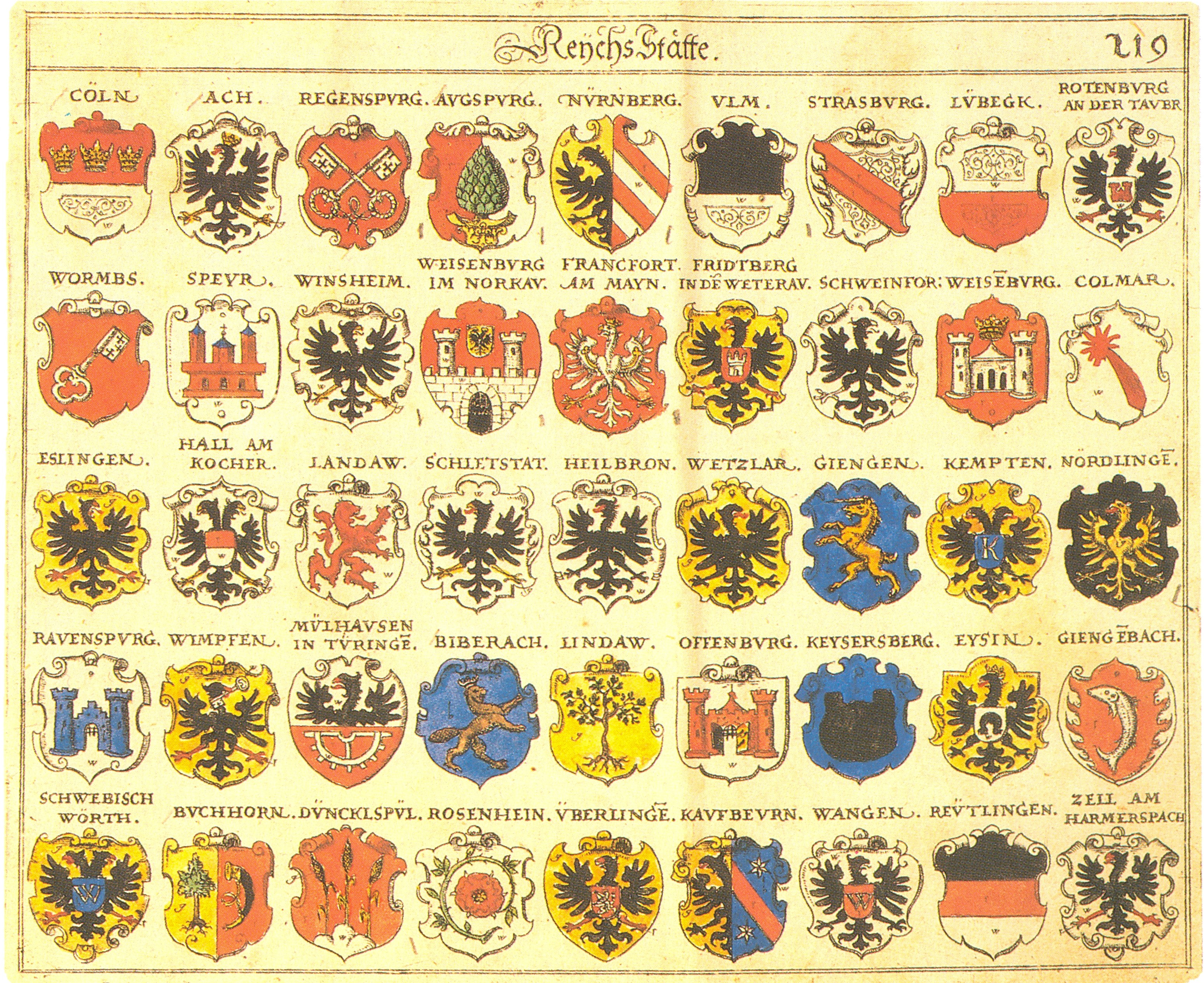 Johann Siebmacher: New Wappenbuch eingescannt aus: Horst Appuhn (Hrsg.), Johann Siebmachers Wappenbuch. Die bibliophilen Taschenbücher 538, 2. verb. Aufl , Dortmund 1989. Reichstädte Blatt 219